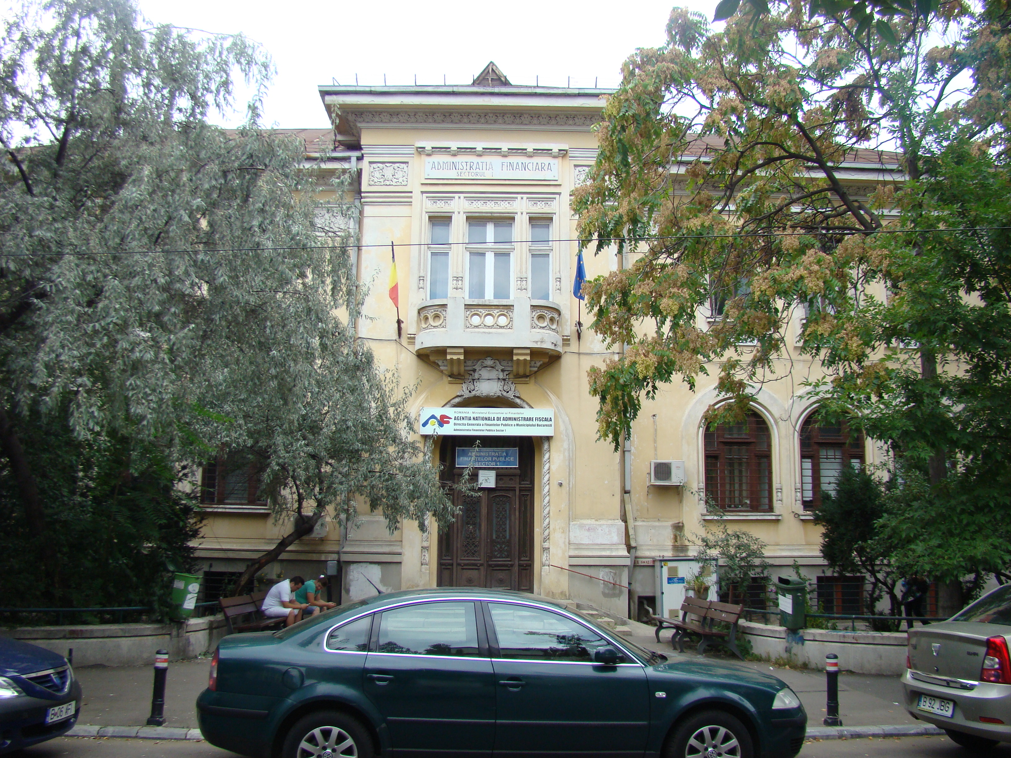 Clădire monument istoric, str. Roma, nr.7 (în prezent Administrația Financiară Sector 1)